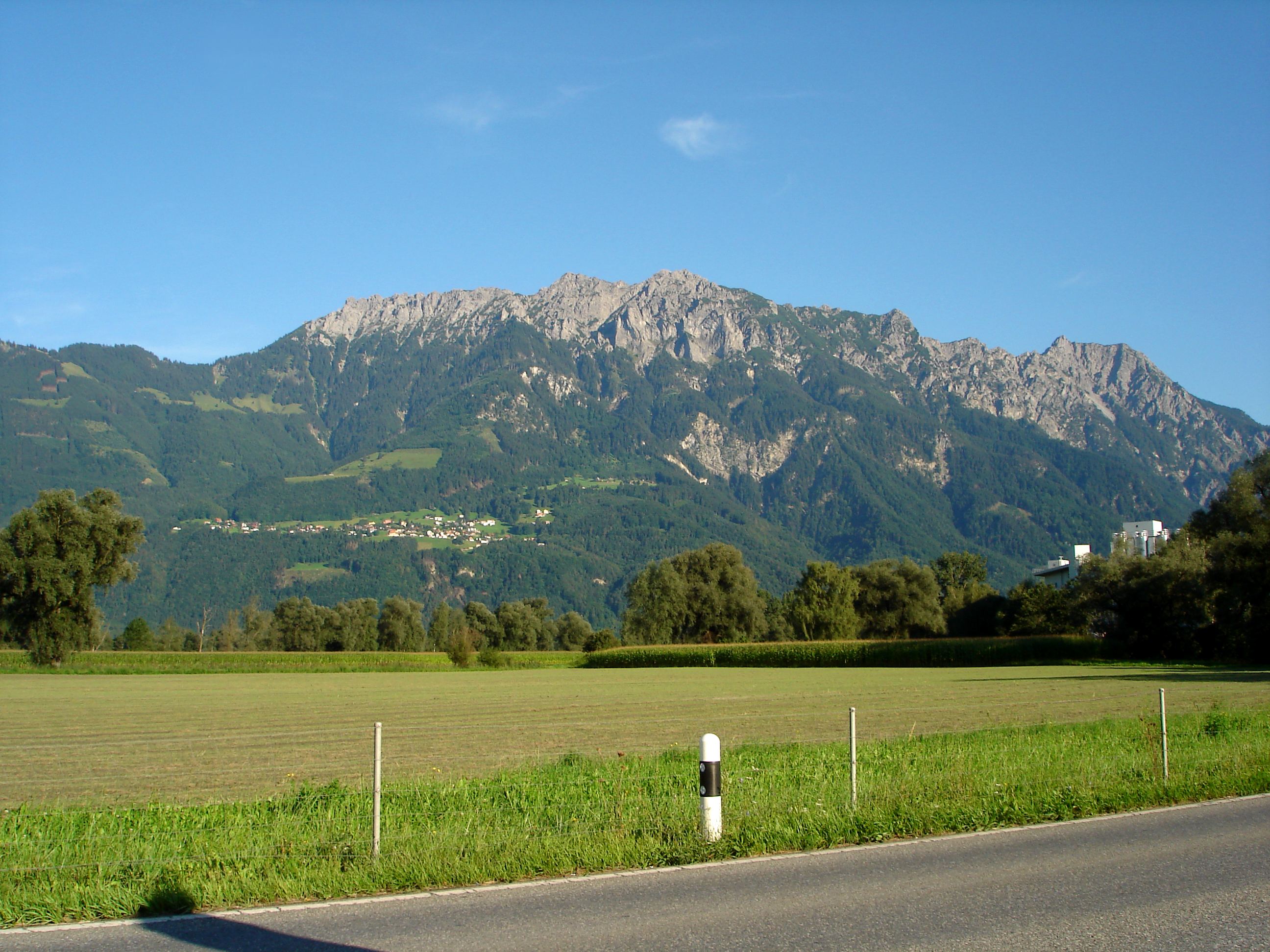 Liechtenstein: Blick auf Planken